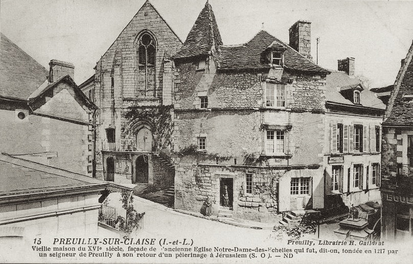 Maison Renaissance (rue Notre-Dame)